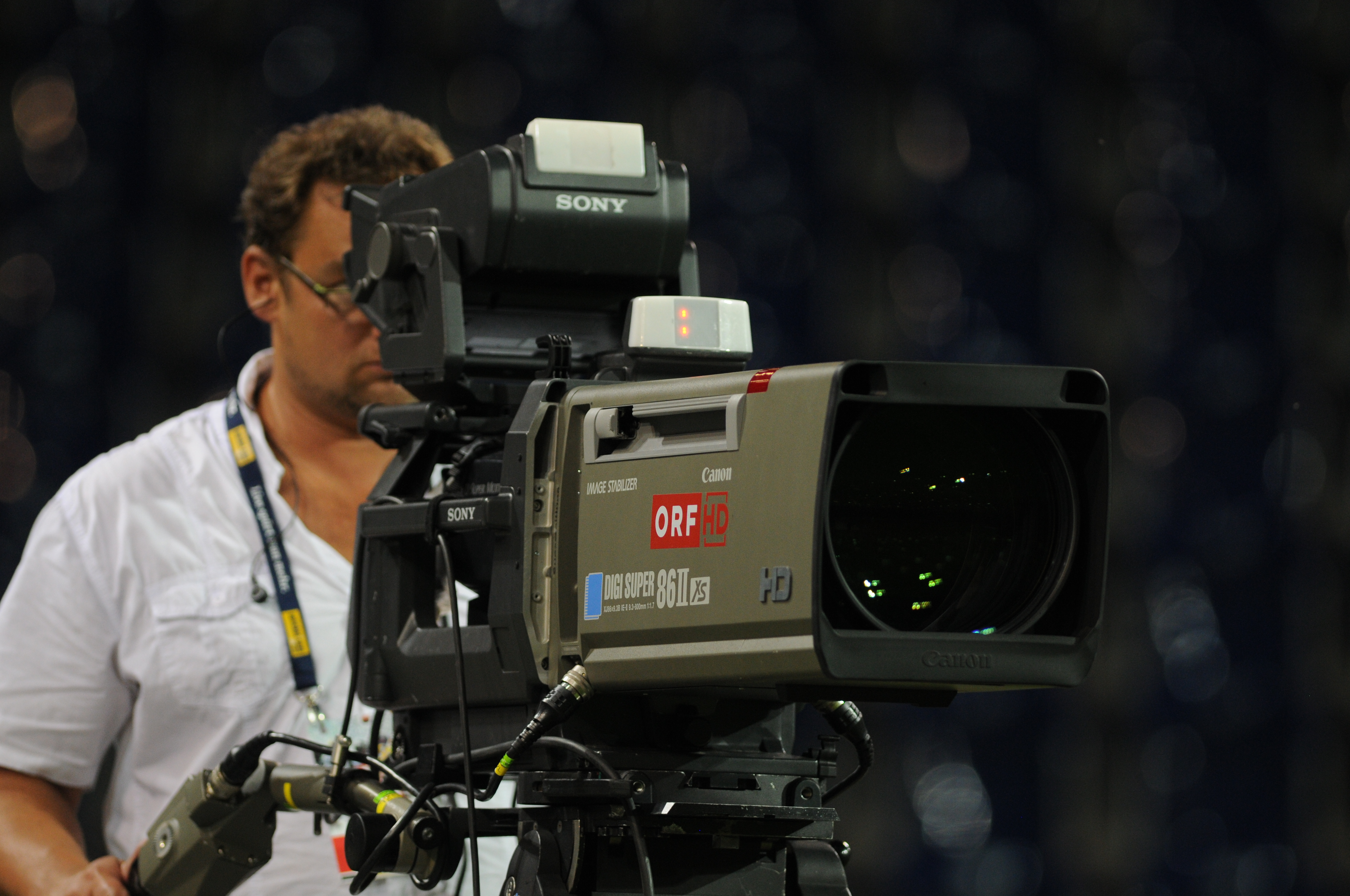 Austrian Bowl XXIX in der NV Arena in St. Pölten